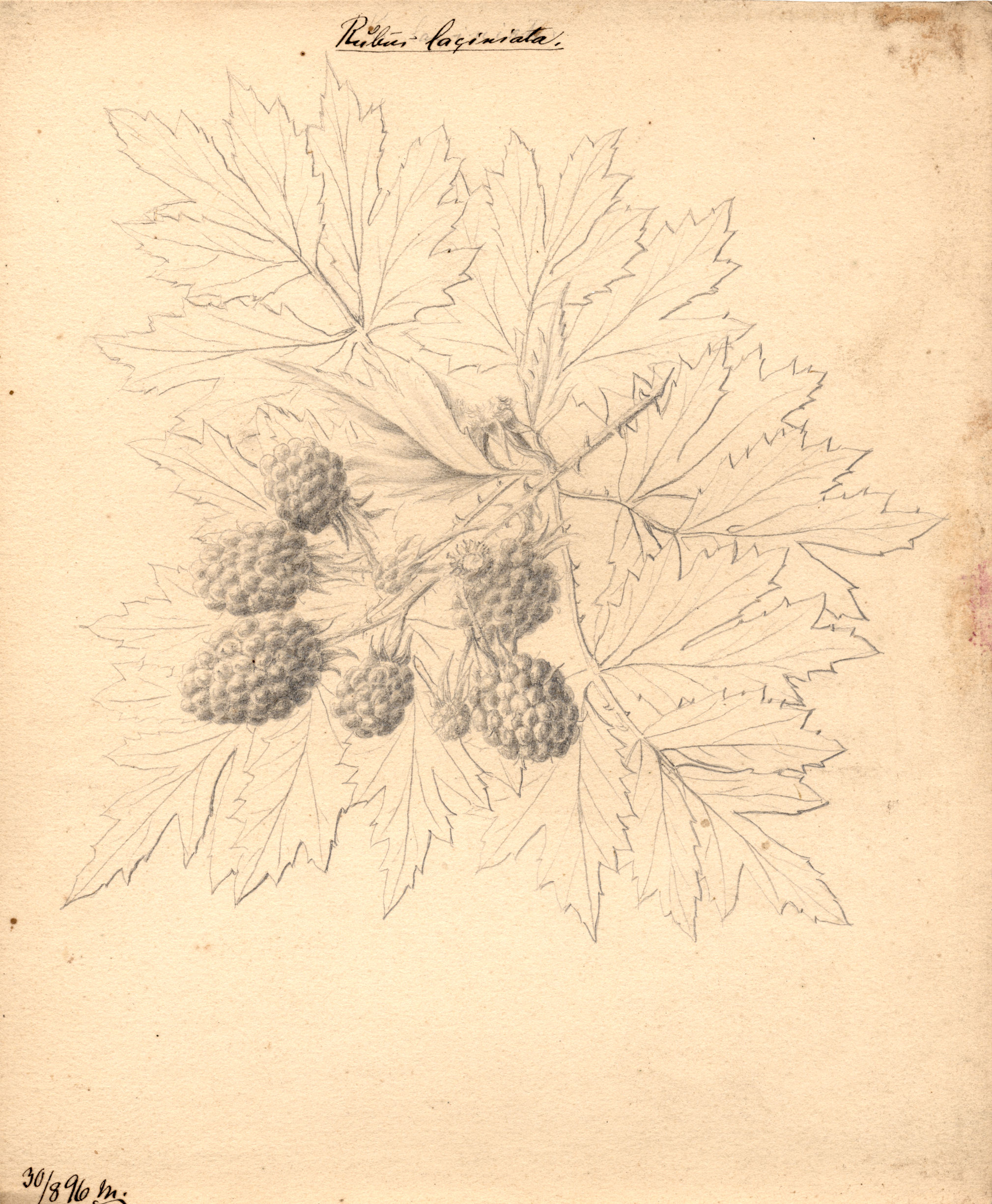 Tegningen findes Kgl. Veterinær- og Landbohøjskole, C. Mathiesens embedsarkiv, C Mathiesens pomologiske tegninger - bærfrugter og blommer. Pomologiske tegninger Tegningerne findes Kgl. Veterinær- og Landbohøjskole, C. Mathiesens embedsarkiv, C Mathiesens pomologiske tegninger - bærfrugter og blommer.